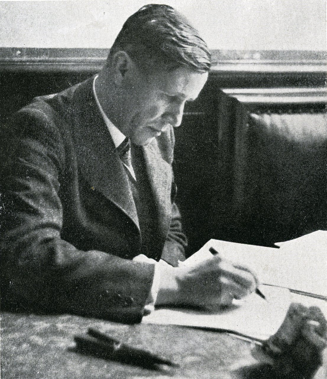 Amos Pokorný, český legionář a šachový mistr